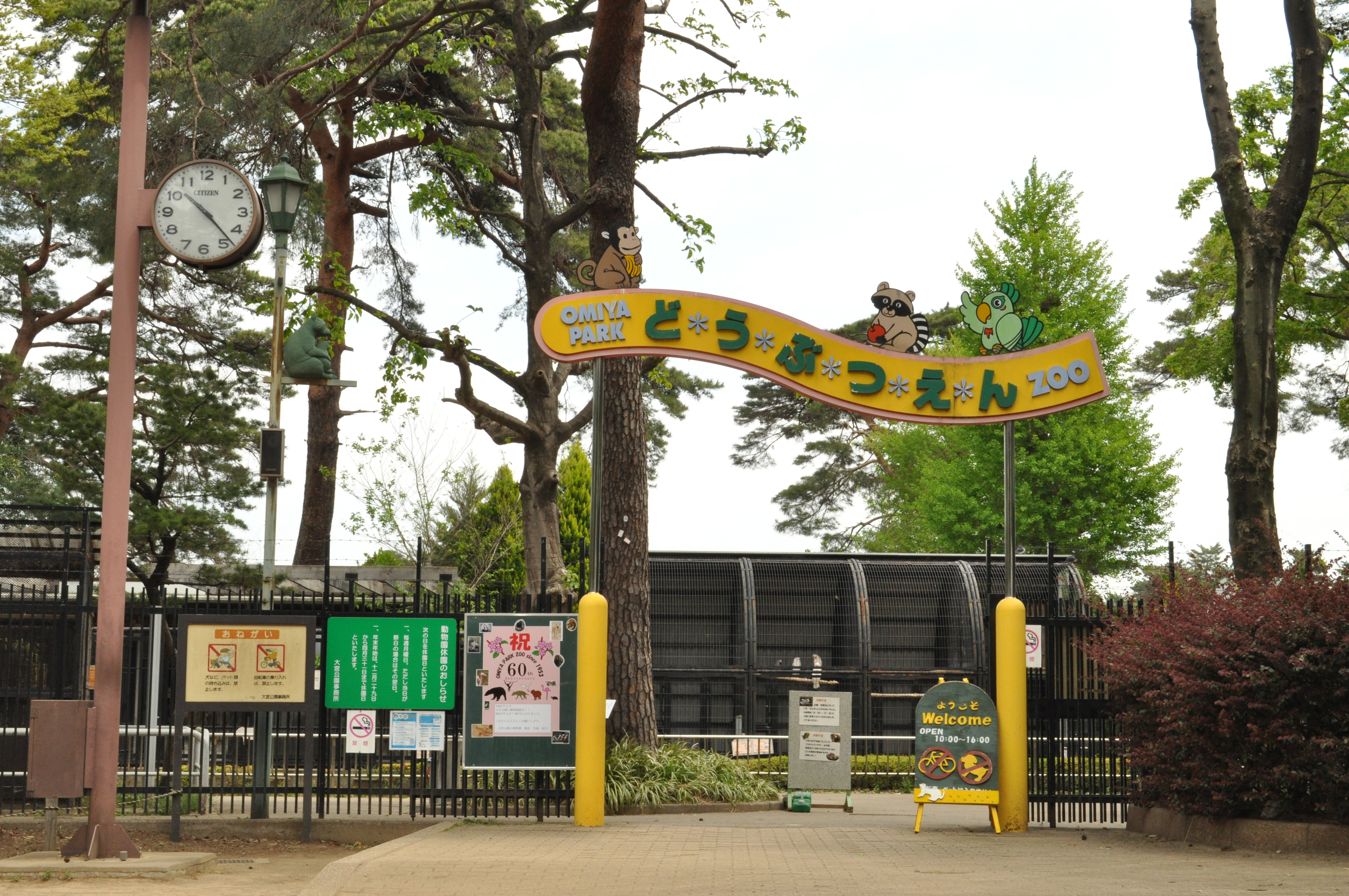 大宮公園小動物園の入り口